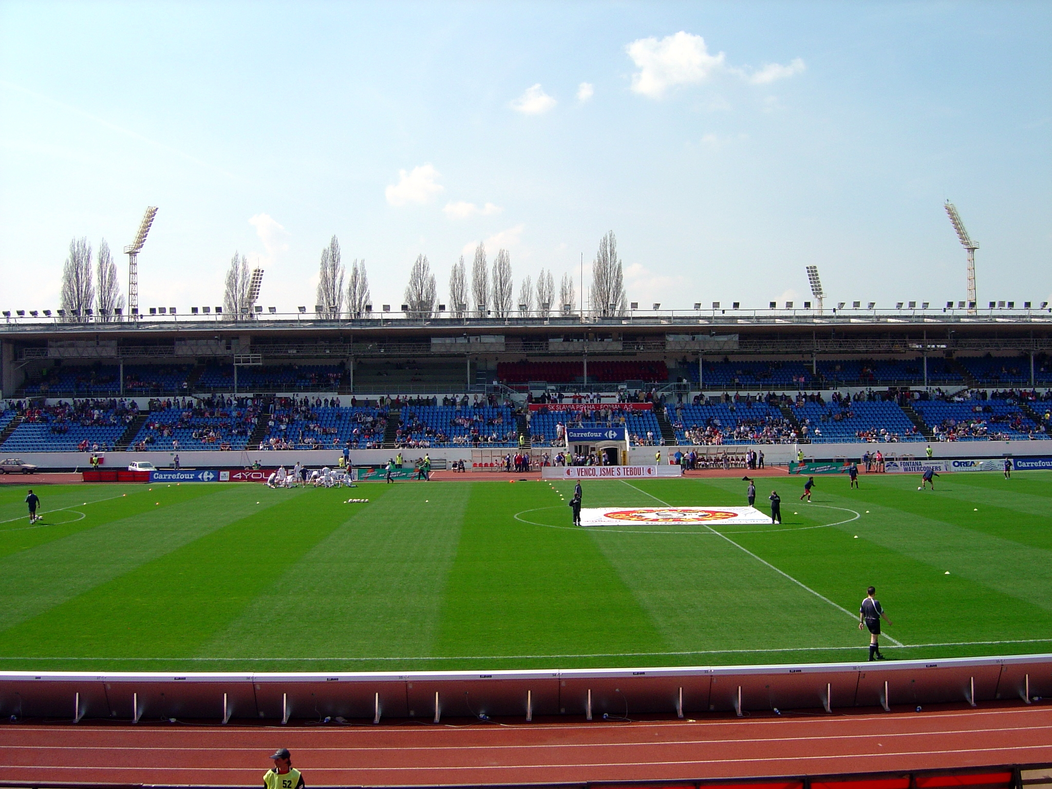 Stadion Evžena Rošického in Prag kurz vor Anpfiff des Derbys Slavia Prag gegen Sparta Prag am 16. April 2005